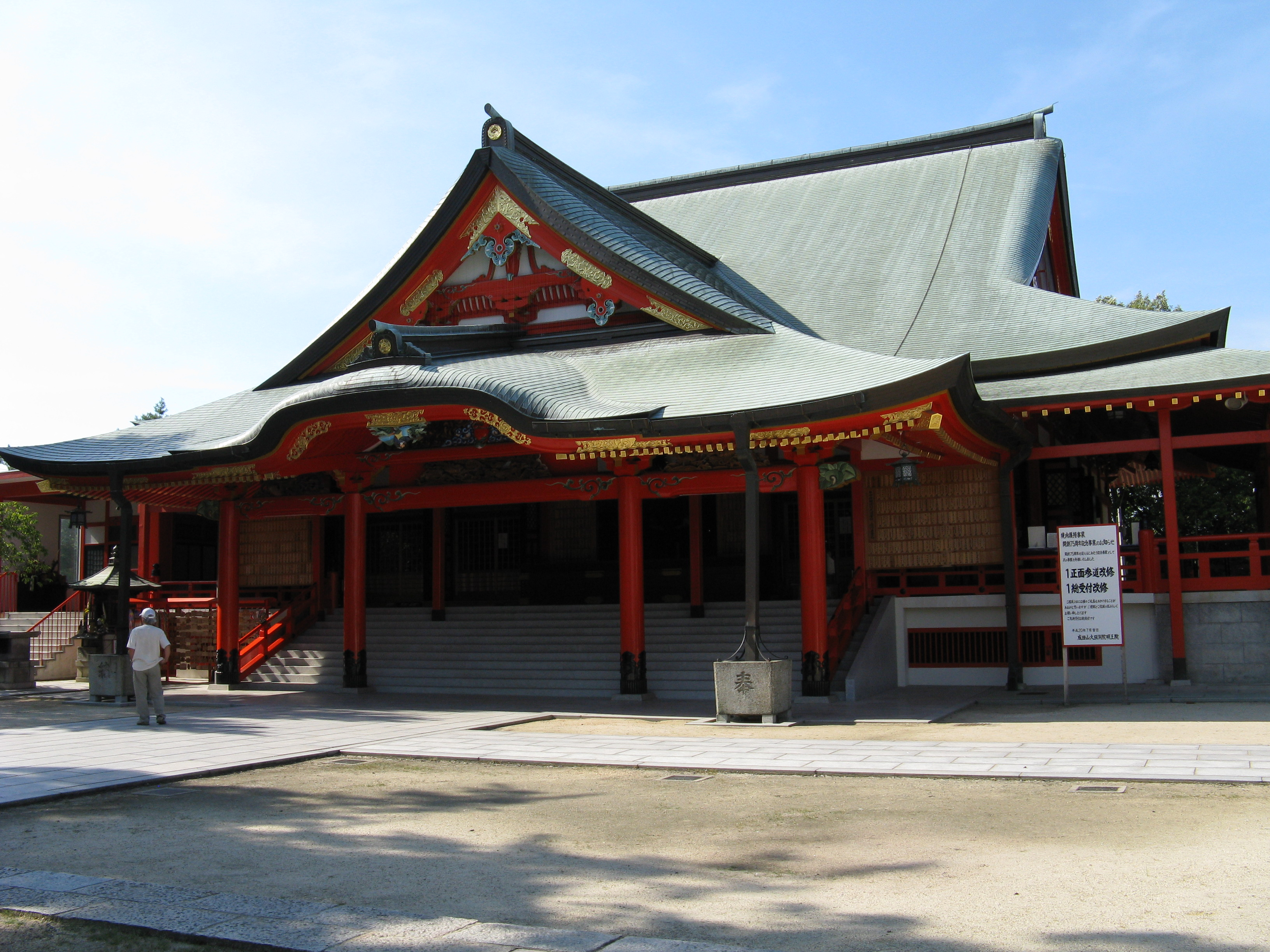 成田山大阪別院明王院 本堂